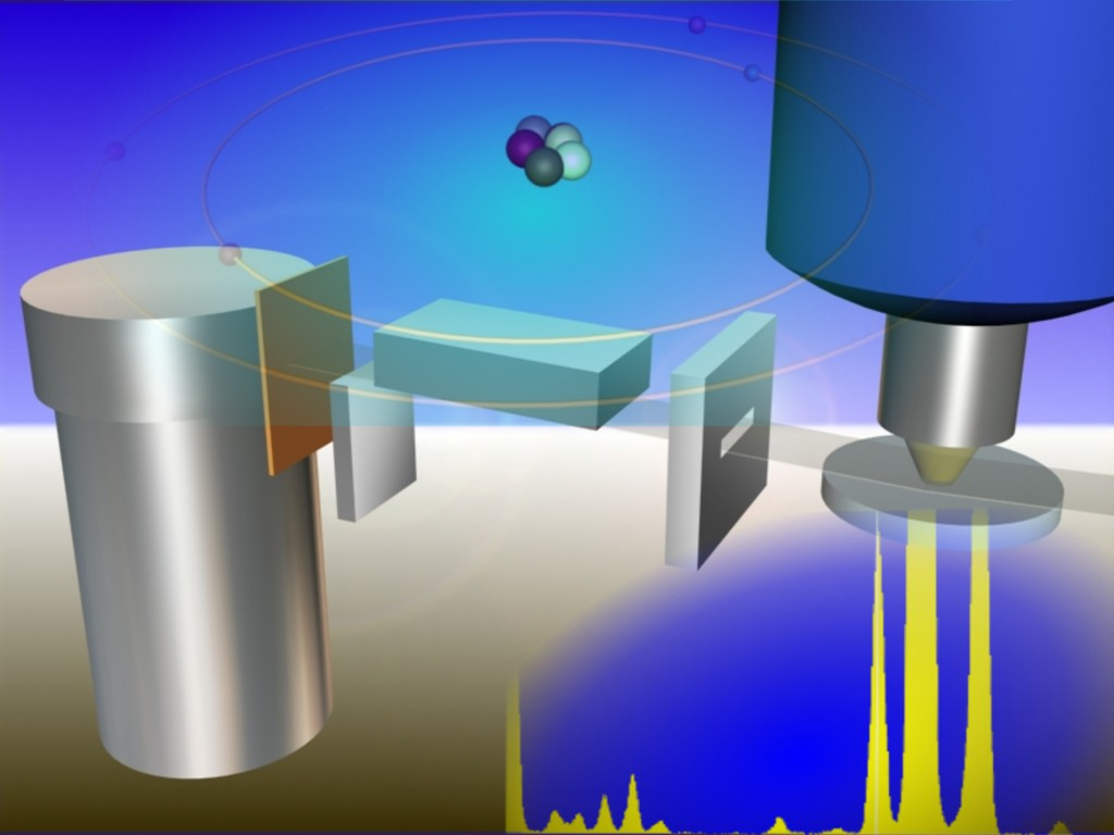 Fundamentos geométricos y analíticos de la espectrometría conocida como Fluorescencia de Rayos X por reflexión Total (TXRF)